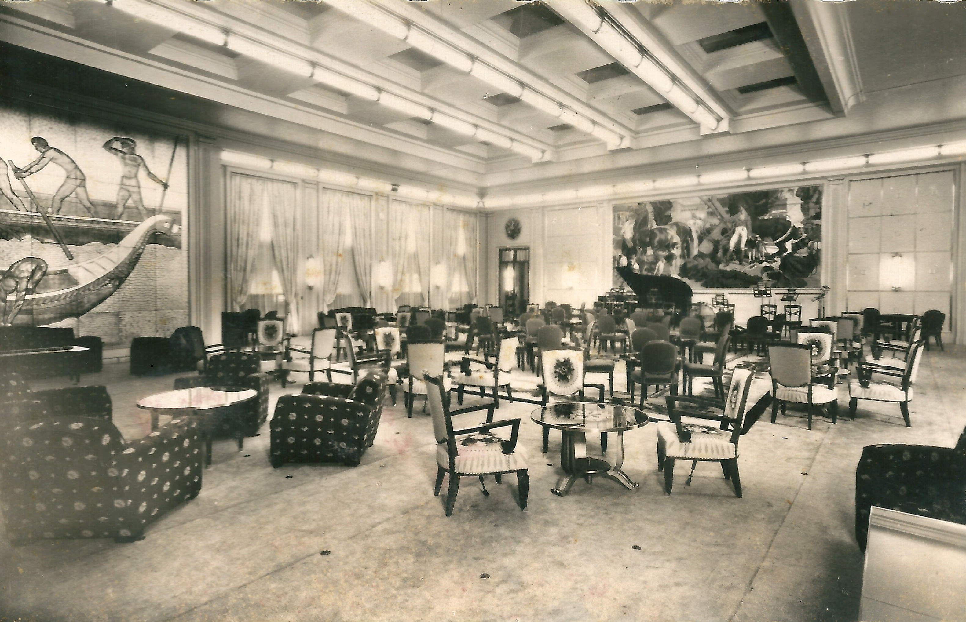 Le paquebot Ile de France" rénové